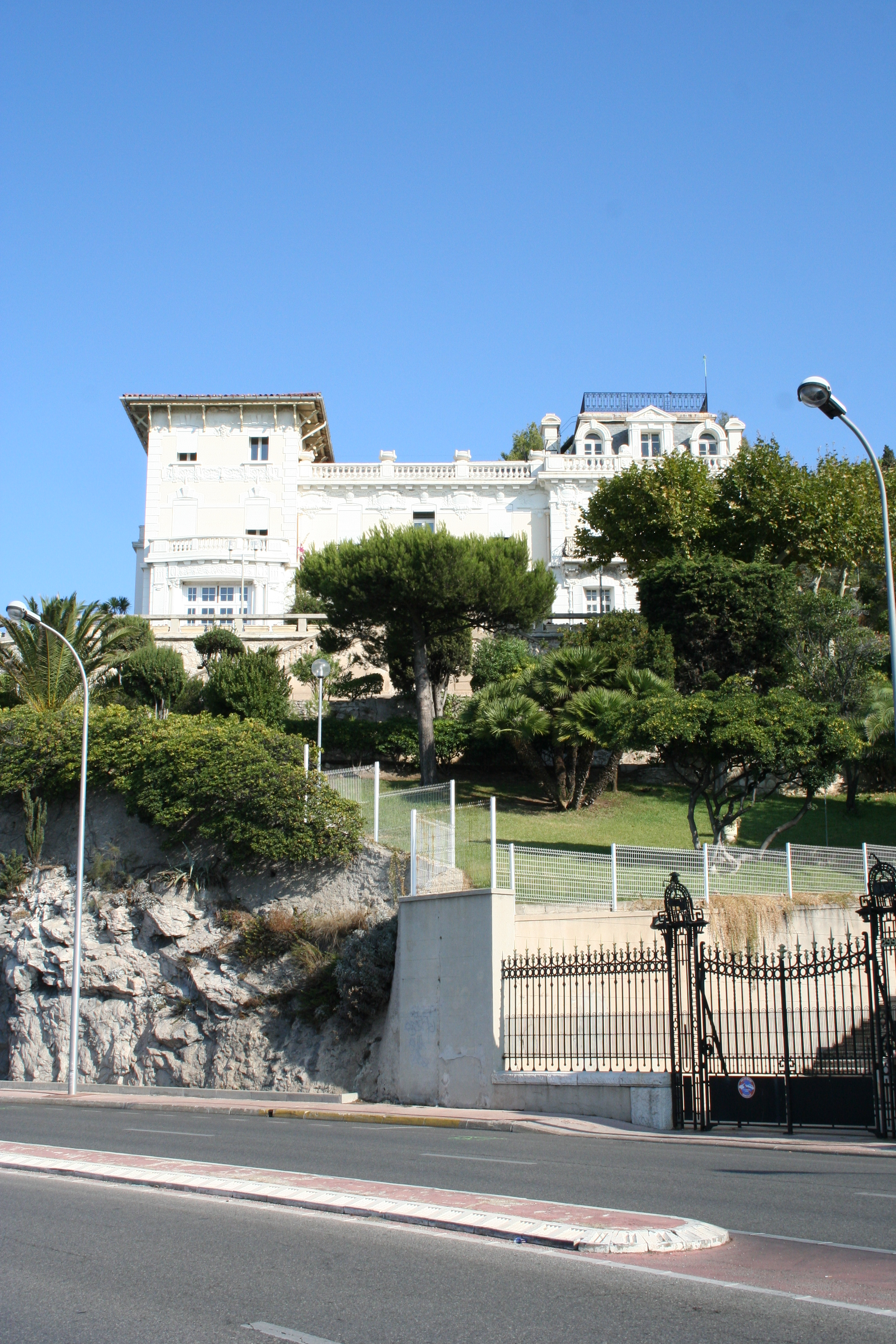 Ancienne villa de Gaby Deslys située au 299 corniche Kennedy à Marseille.